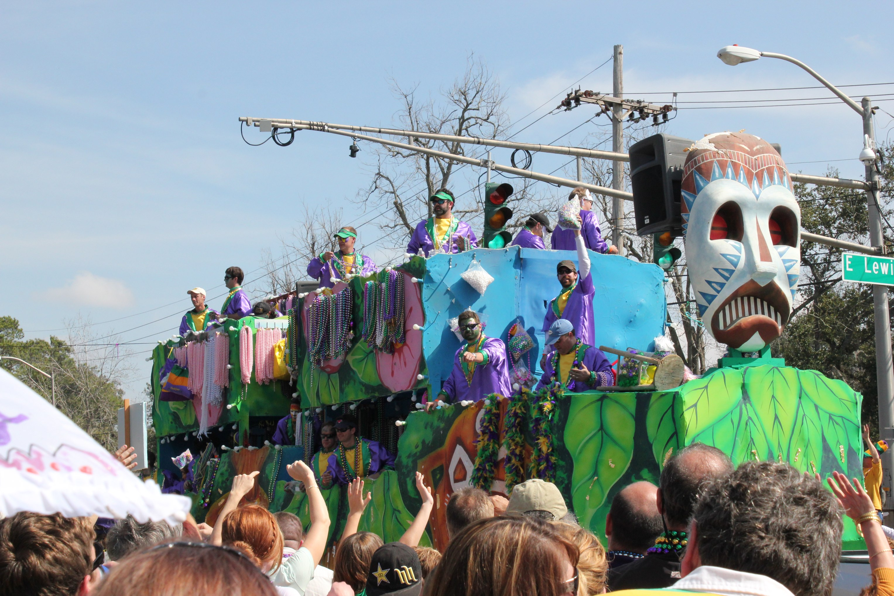 Lafayette Louisiana Mardi Gras 2012